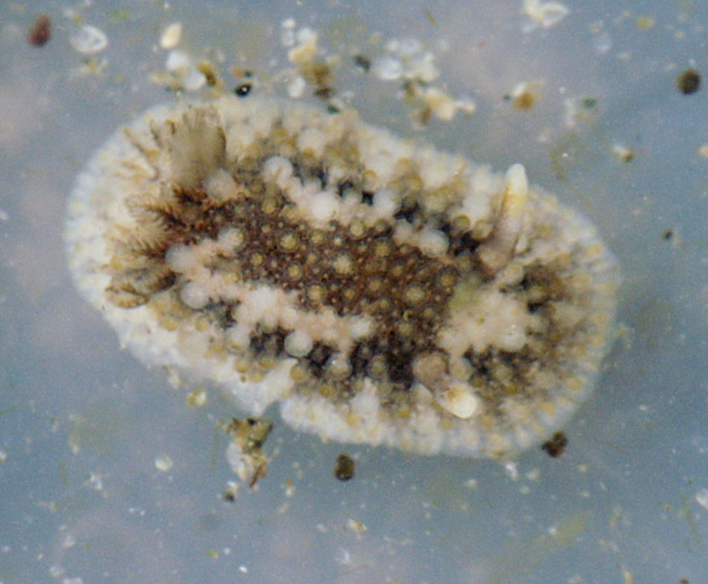 Onchidoris bilamellata